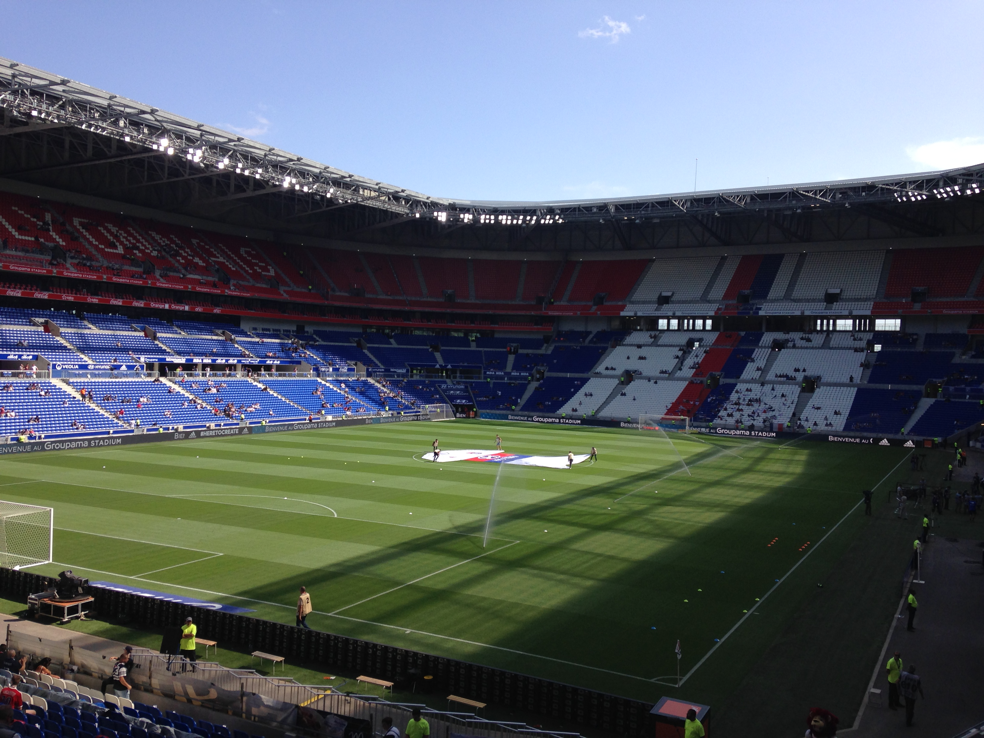 Groupama Stadium